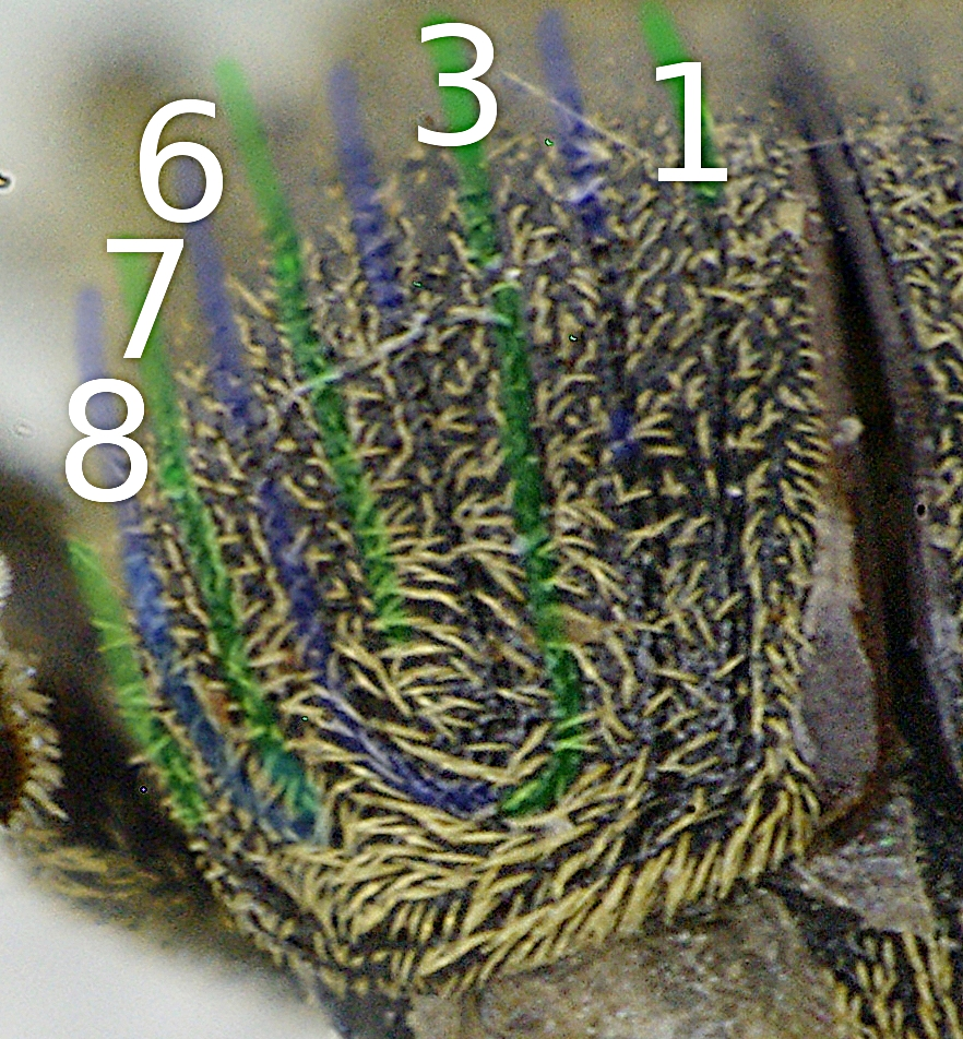 Rhinusa asellus aus Ungarn bei Nádasd am 31. Juli 2015, Verlauf der Punkreihen am Apex der Flügeldecken